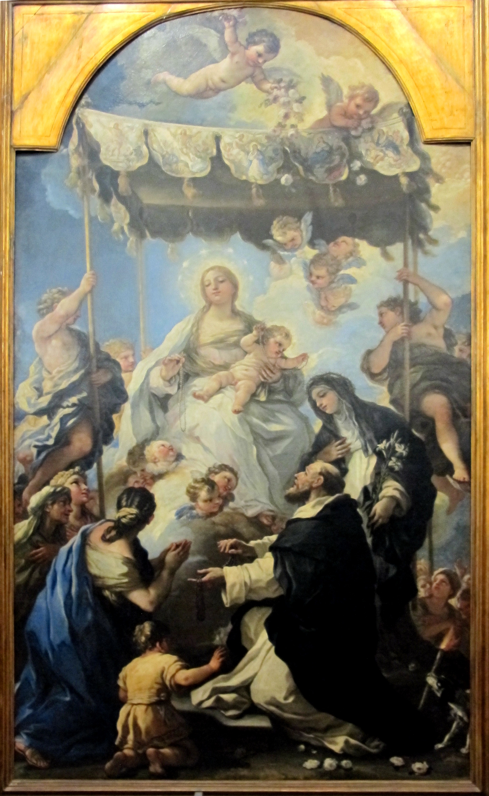 Galleria Napoletana (Museo di Capodimonte)